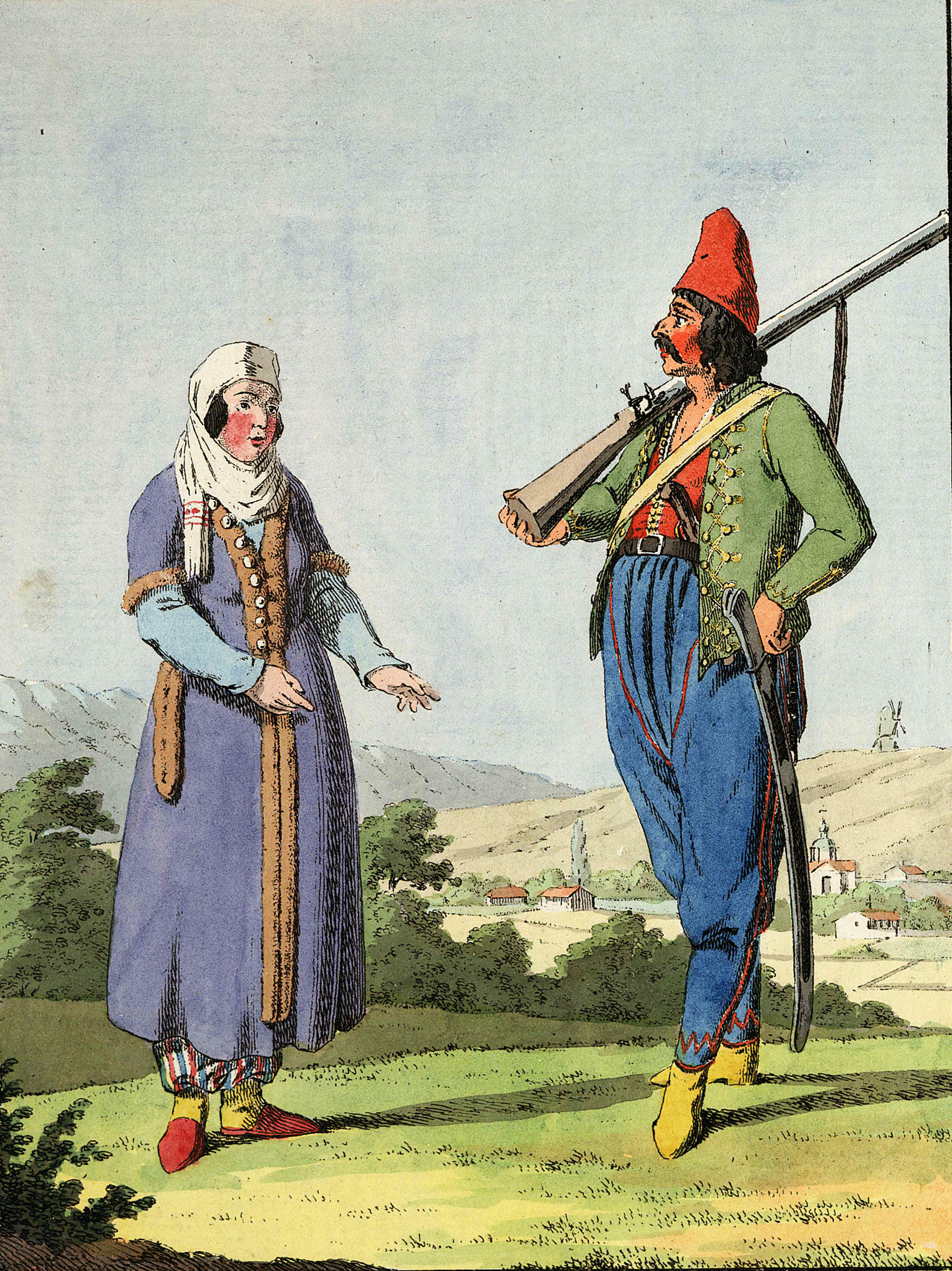 2-20. Простой арнаут упомянутого Албанского батальона с женой.